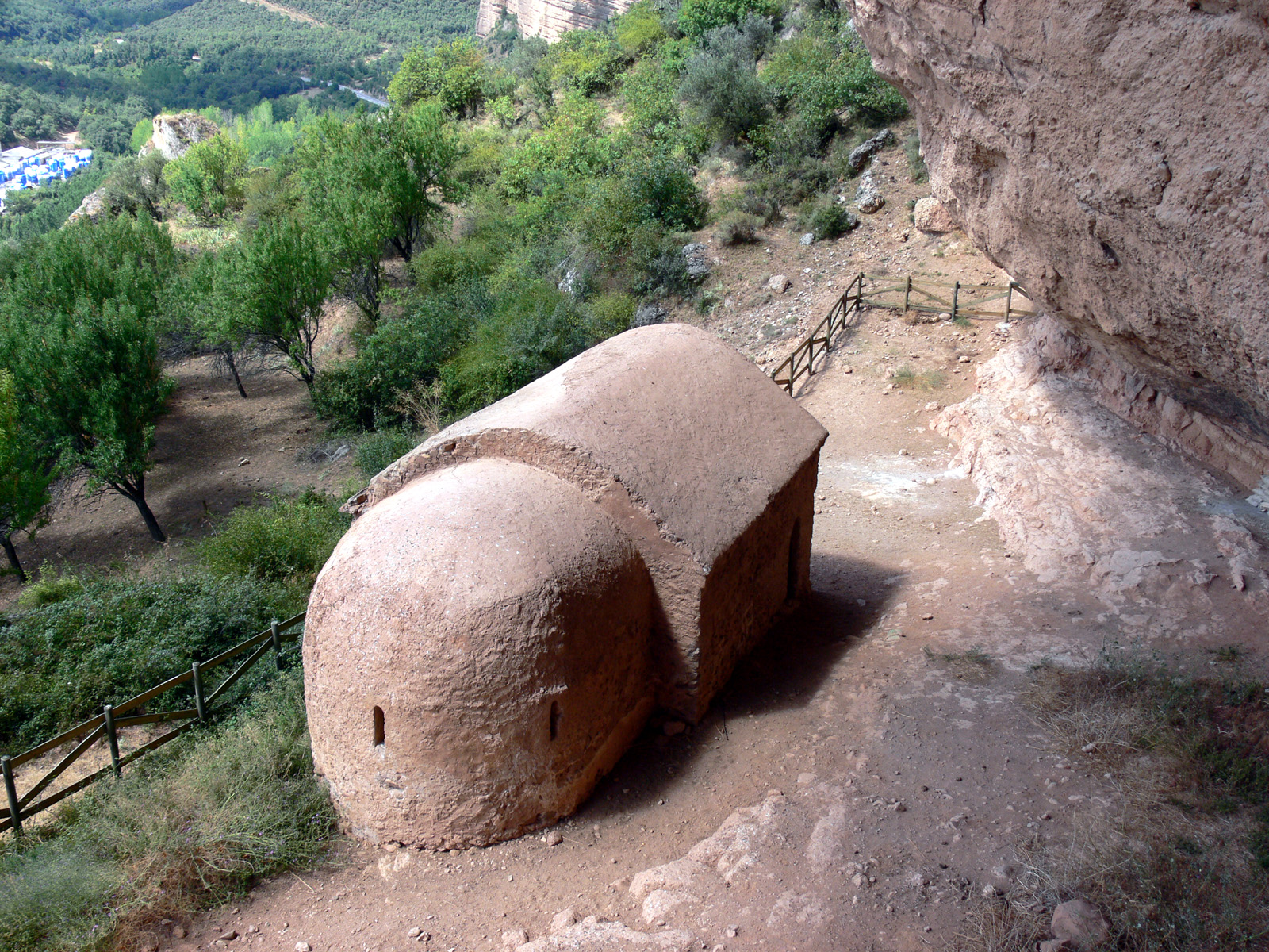 Ermita pre-románica de San Esteban en Viguera, La Rioja - España.